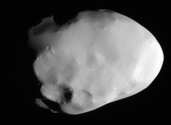 텔레스토. Telesto, a moon of Saturn, seen by the Cassini probe, October 2005 original upload on en.wiki by User:The Singing Badger